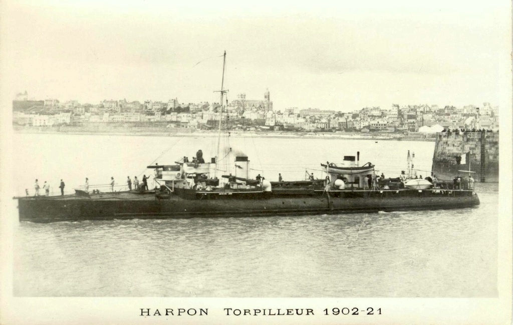 Contre-torpilleur français : Harpon (Classe Arquebuse)